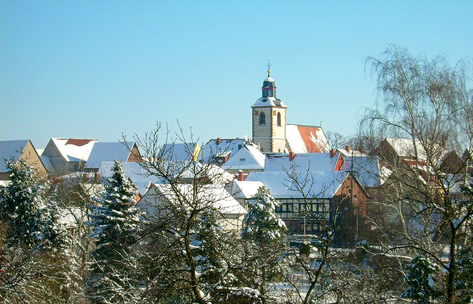 Blick auf Steinbach.